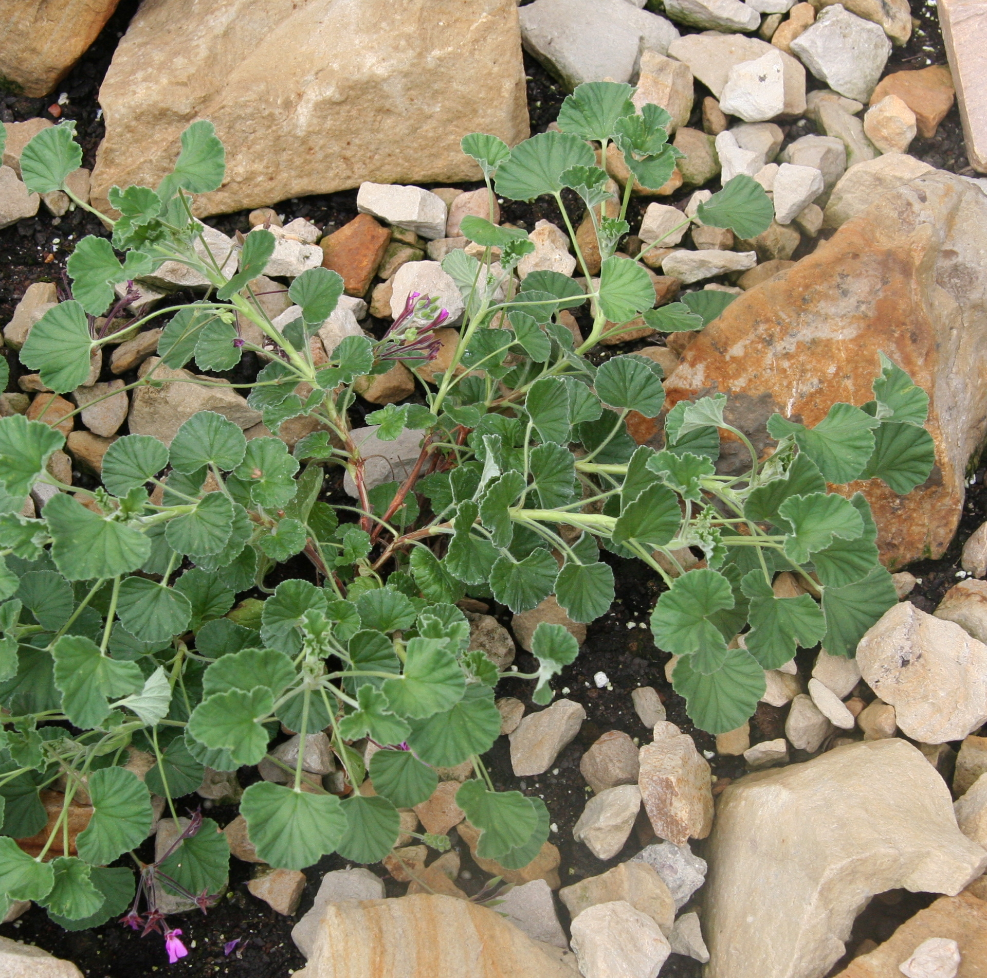 Pelargonium_sidoides im Alten Botanischen Garten Hamburg